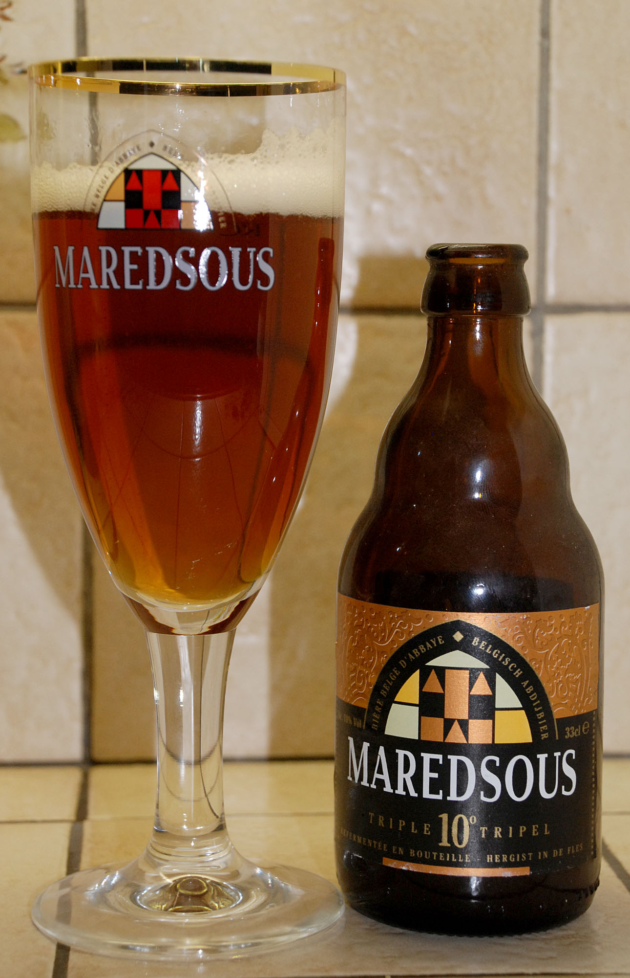 Maredsous 10